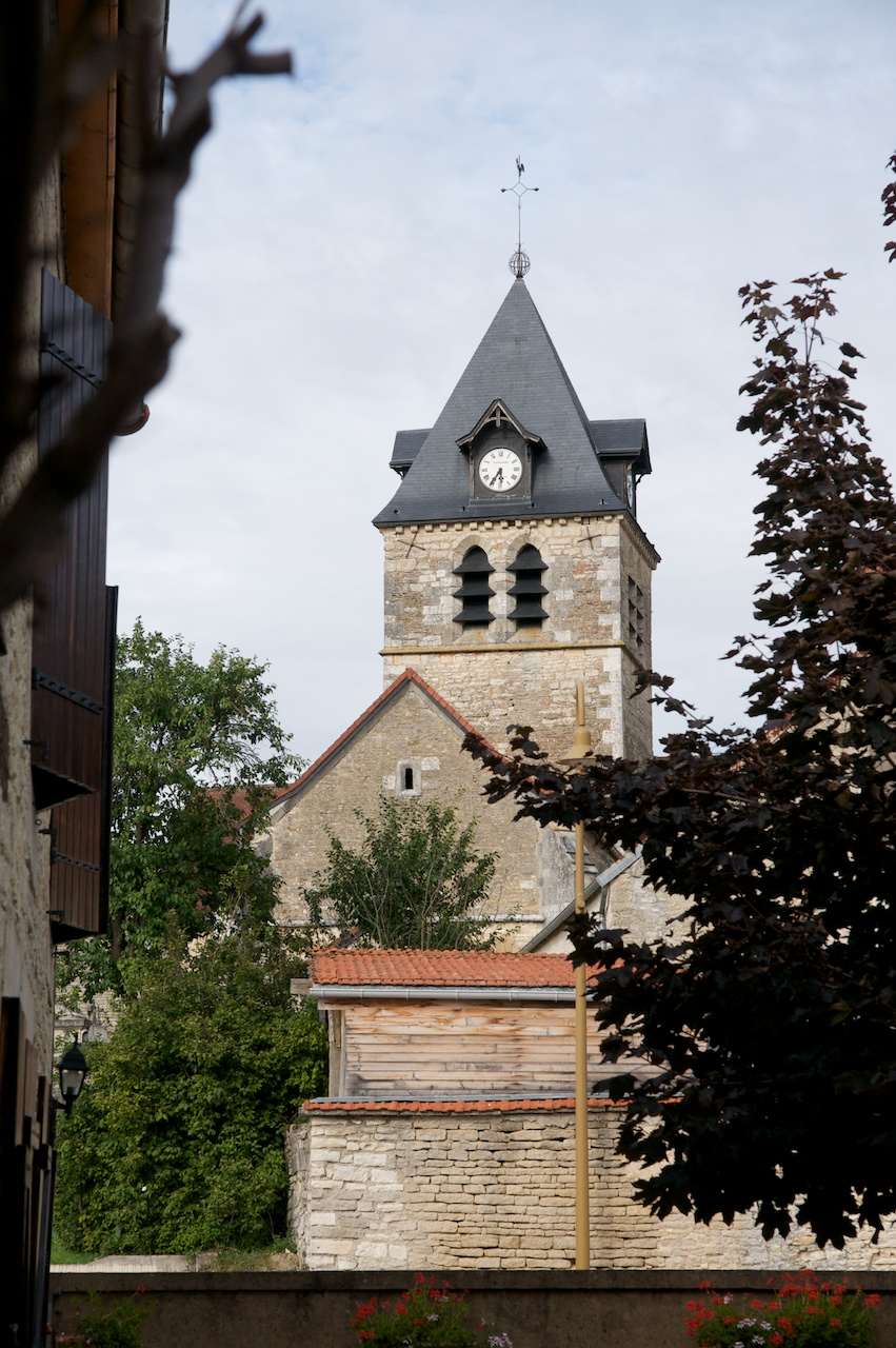 Église de Braux-le-Châtel (Haute-Marne, Champagne-Adenne, France), le clocher. .